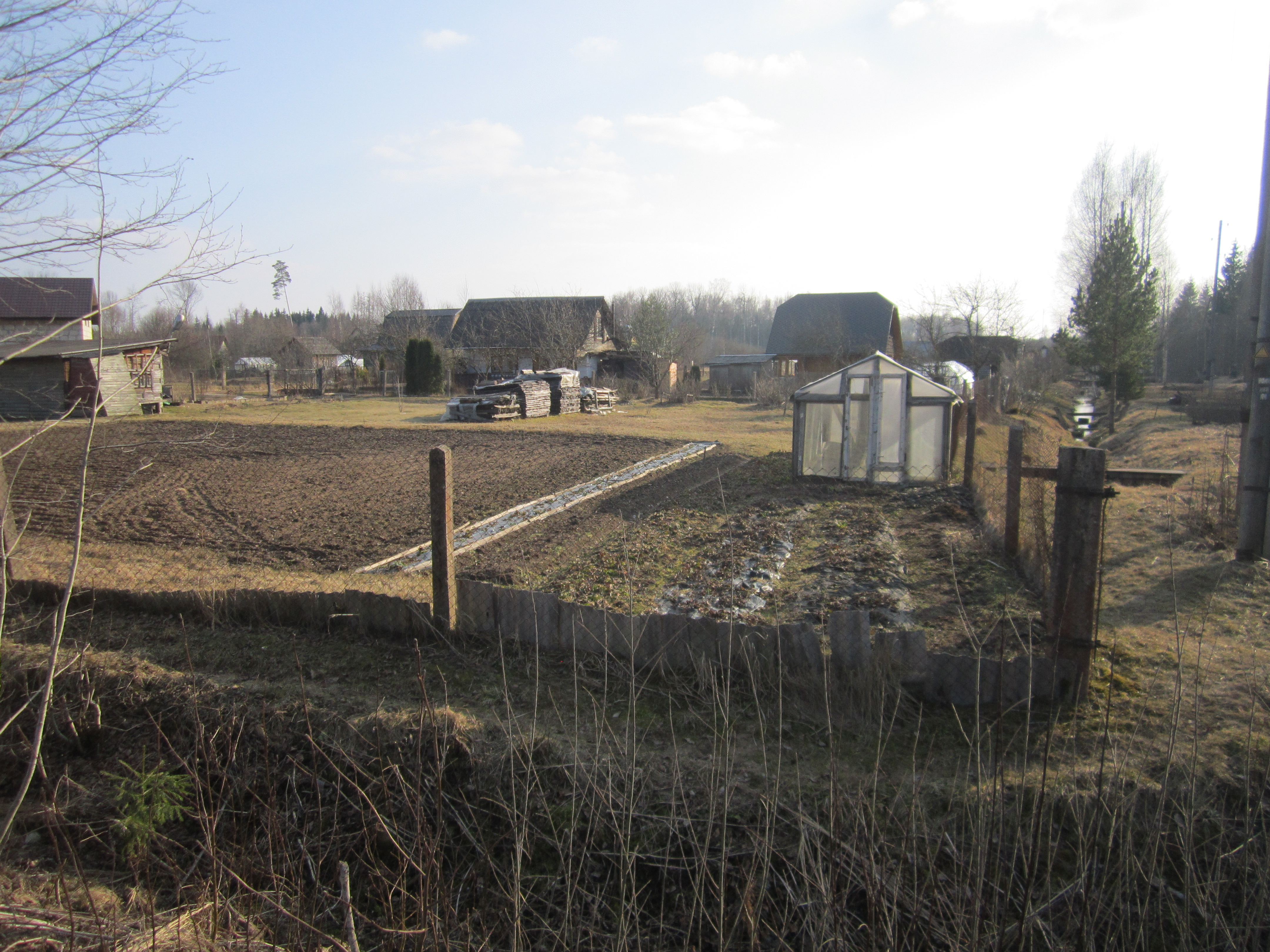 Agrs pavasaris dārzciemā Glāznieki